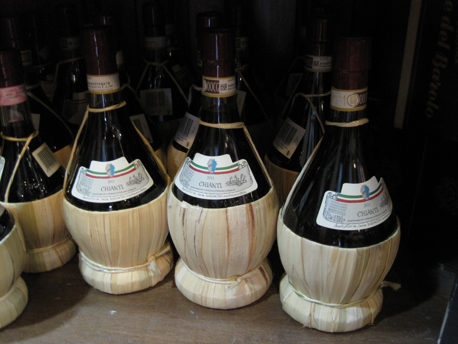 Chianti (wine)